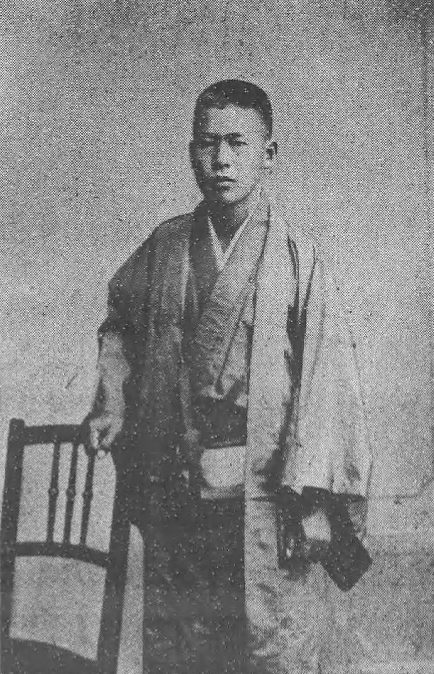 明治41年9月支那奉天府日本町松村寫眞館ニテ撮影